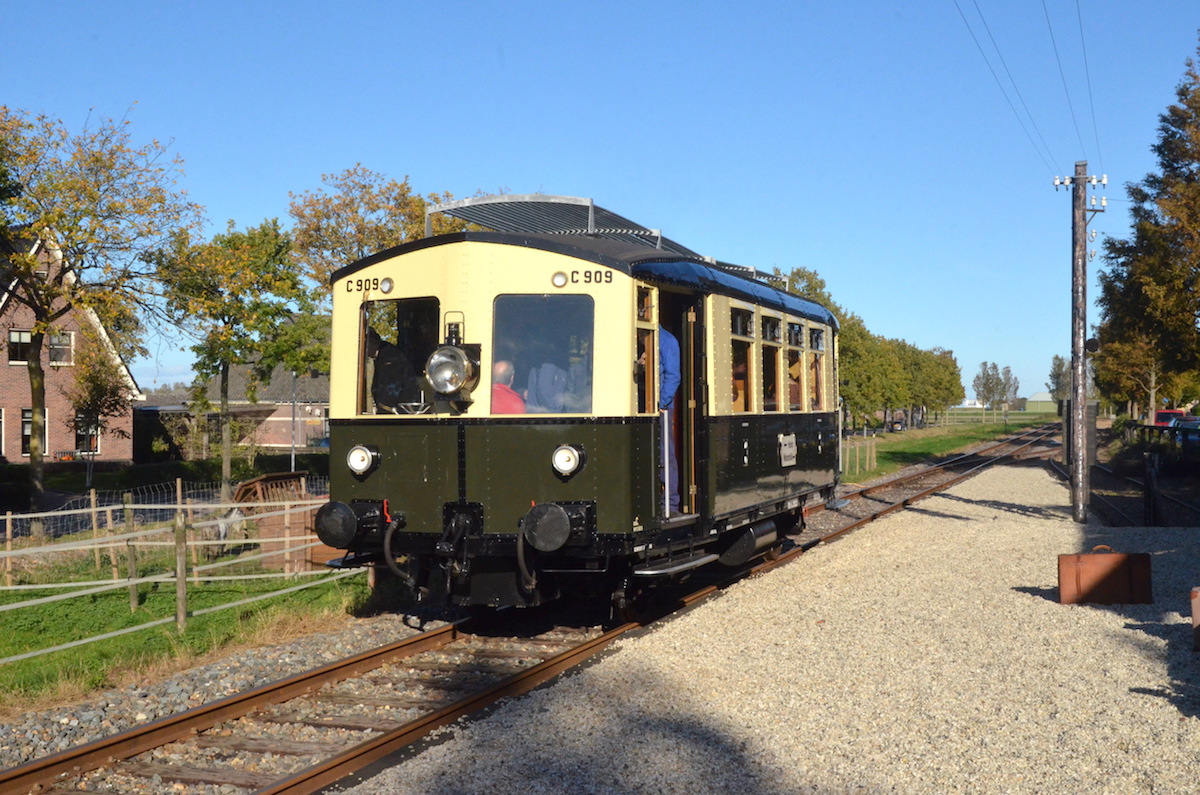 Motorwagen NS C 909 van de SGB op bezoek bij de SHM, te Opperdoes; 28 oktober 2018. Foto: Erik Swierstra.